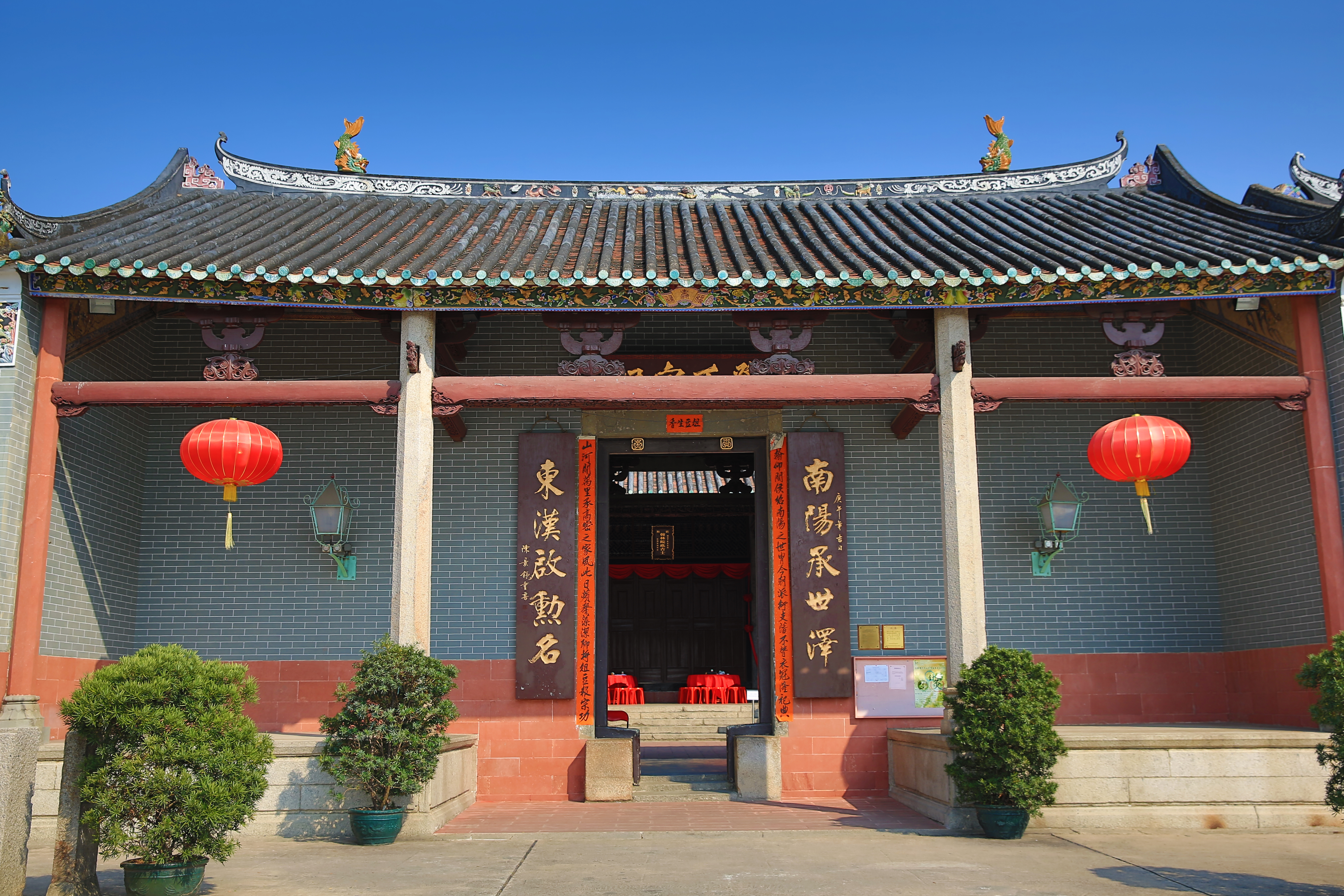 鄧氏宗祠座落於香港屏山，是鄧族的祖祠，由屏山的三圍六村所環抱。